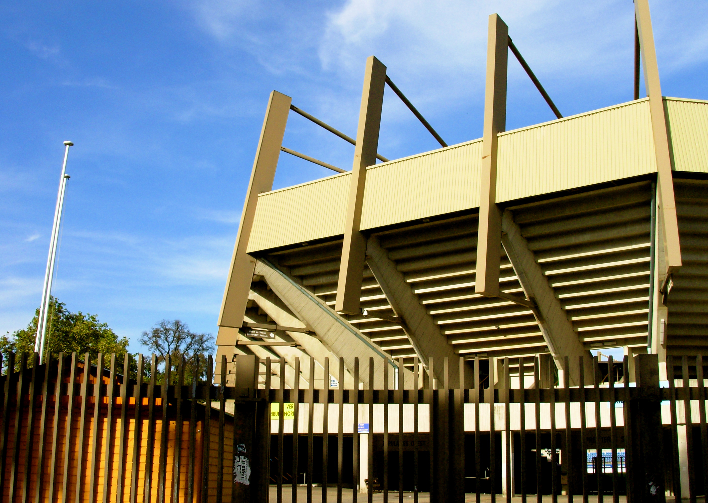 Stade de la Meinau, Strassbourg Fassade